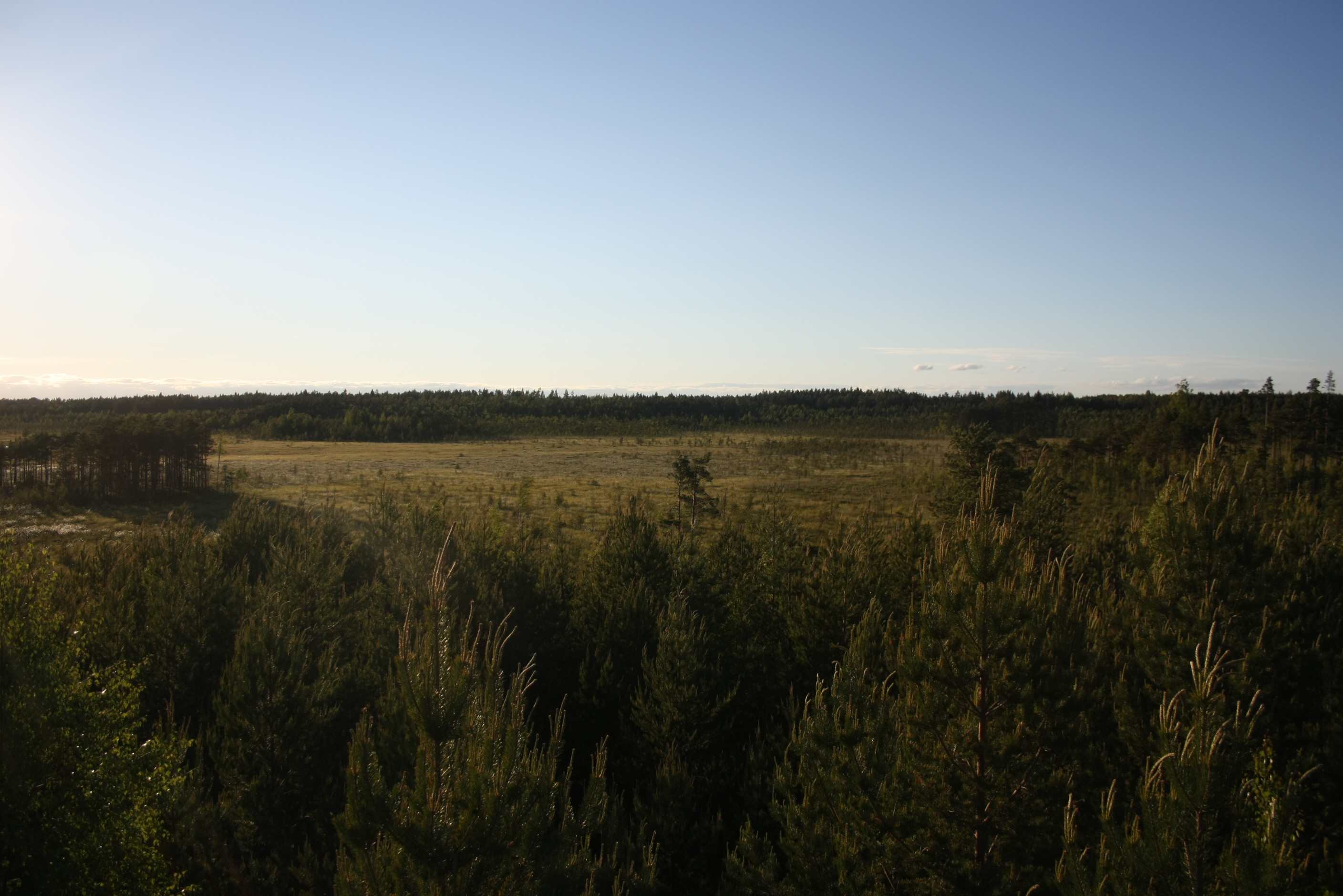 Muraka looduskaitseala, vaade Rüütli soole.